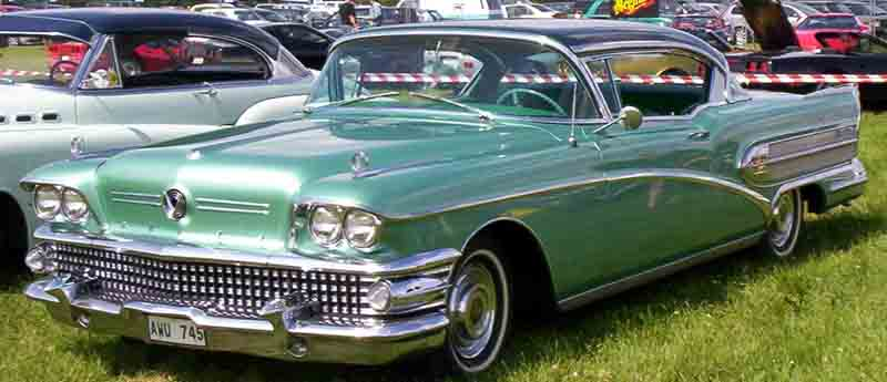 1958 Buick Roadmaster Series 75 Model 75R 2-door Hardtop